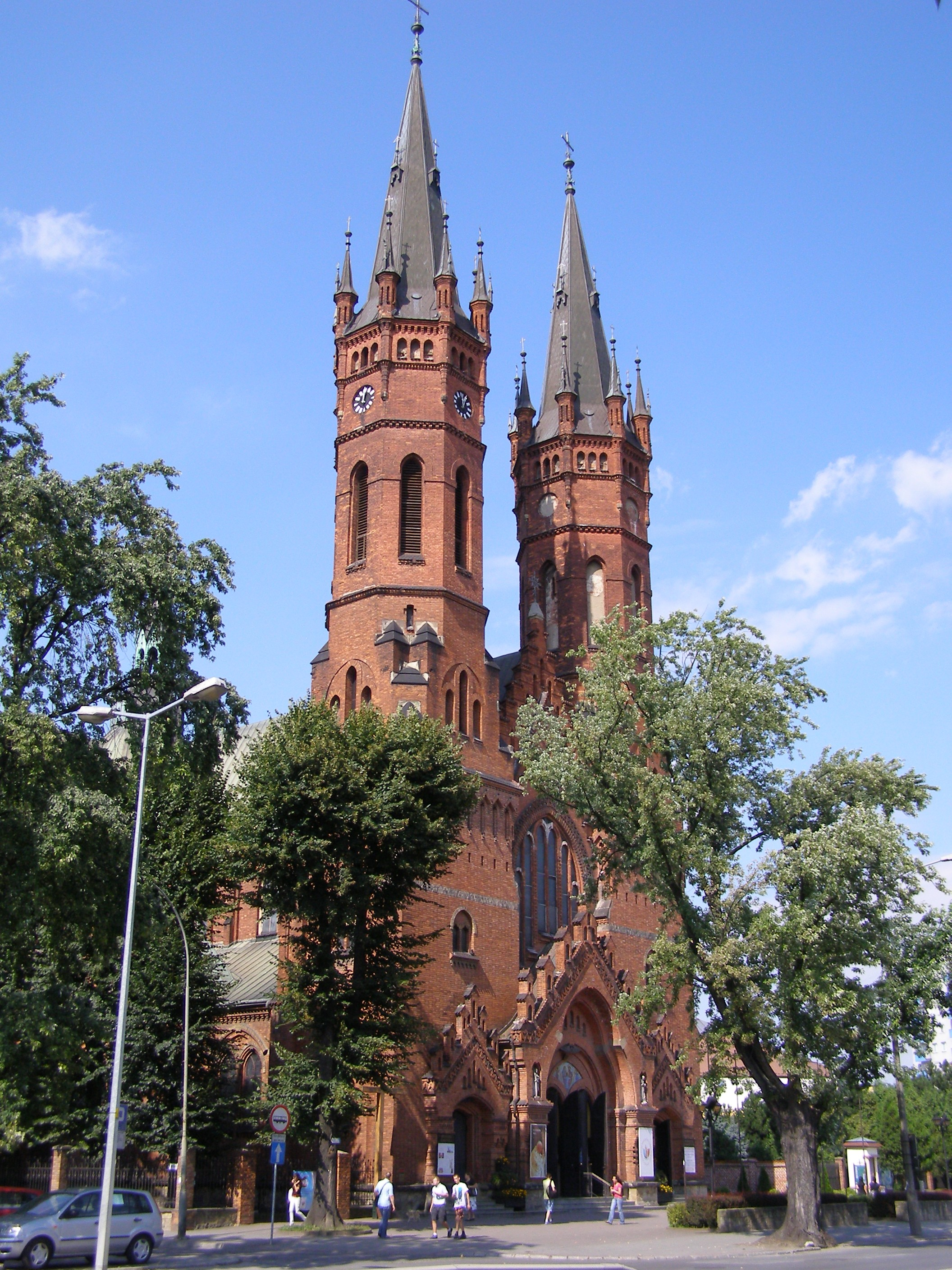 Tarnów - kościół Św. Rodziny ks. misjonarzy